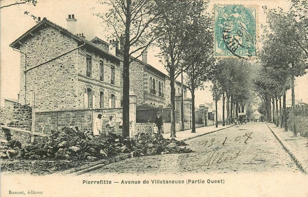 Pierrefitte.Avenue de Villetaneuse.Avenue Gabriel-Péri.Partie Ouest